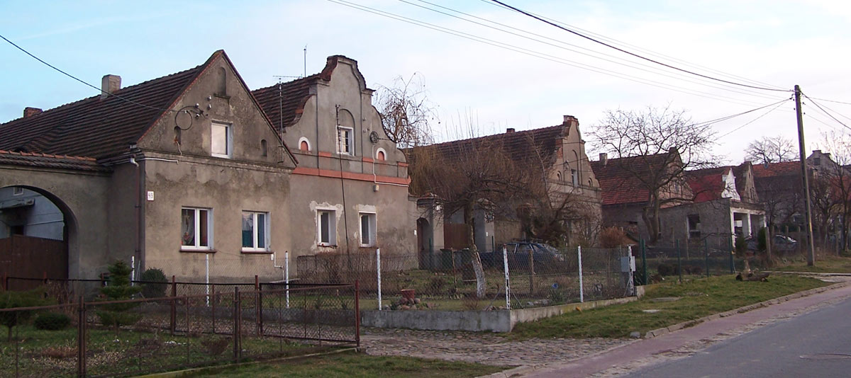 Domy przy ul. Okrężnej w Głogowie - Brzostowie.